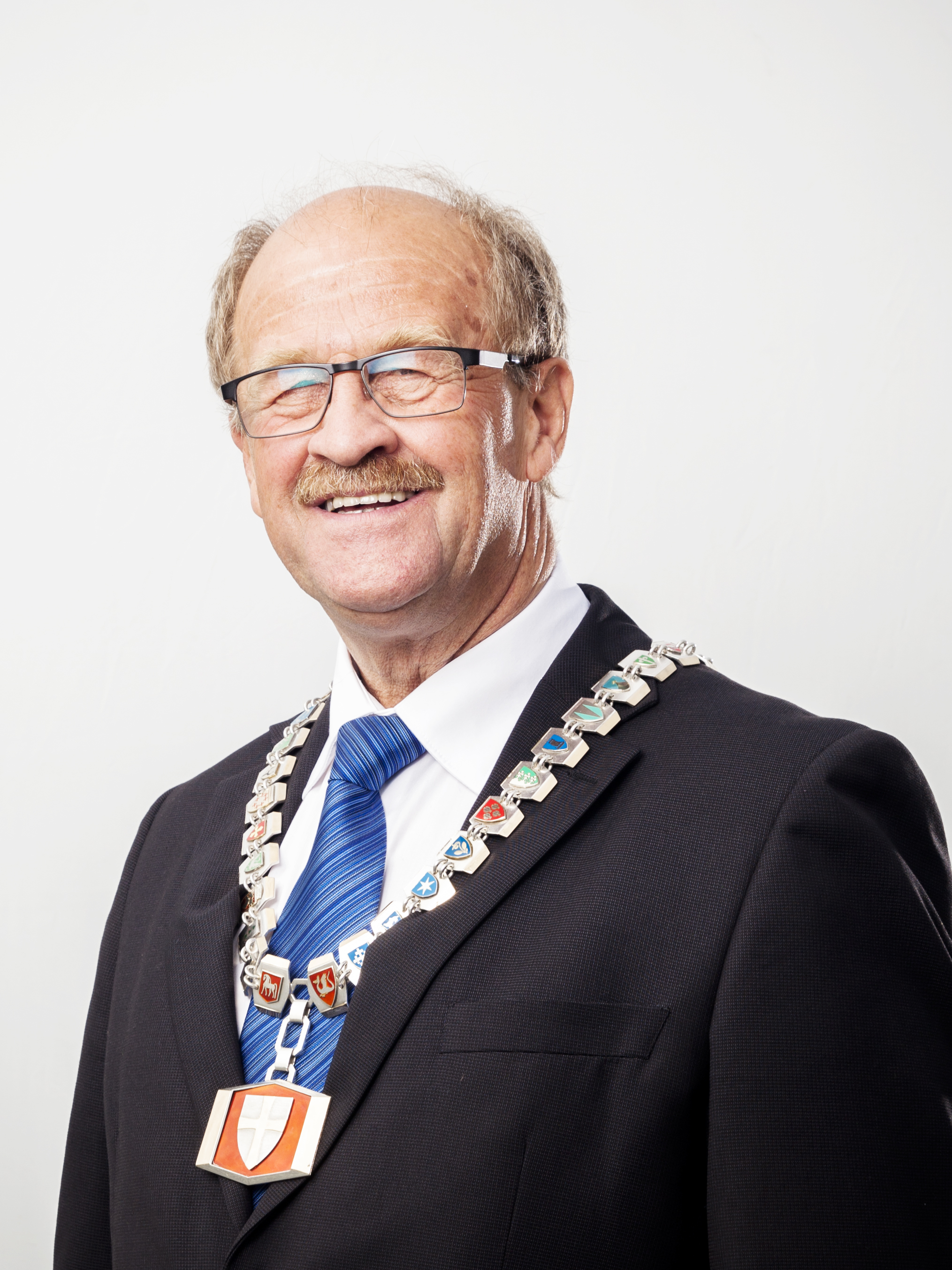 Gunnar Viken